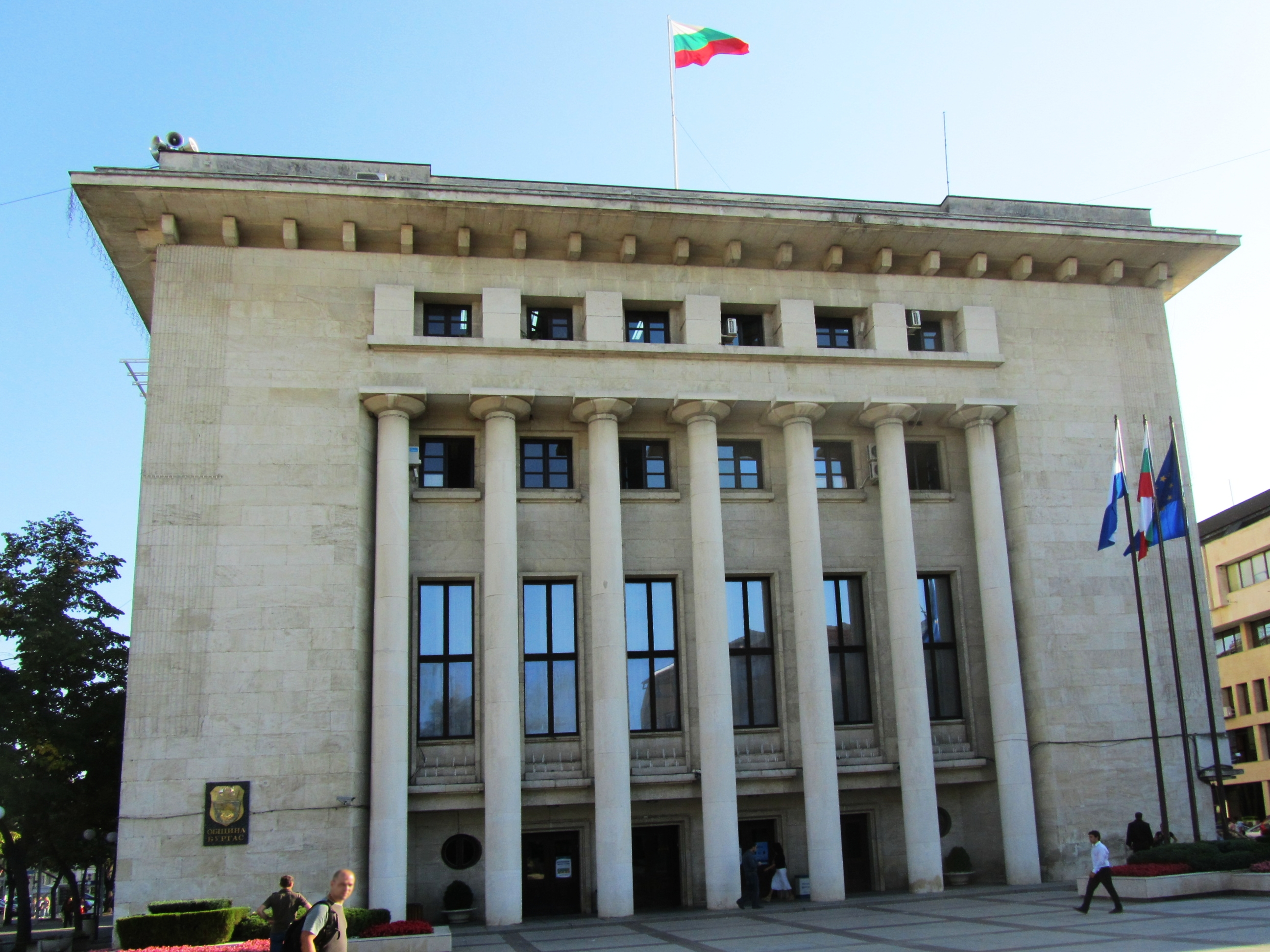 Сградата на Община Бургас (1927), Бургас, България